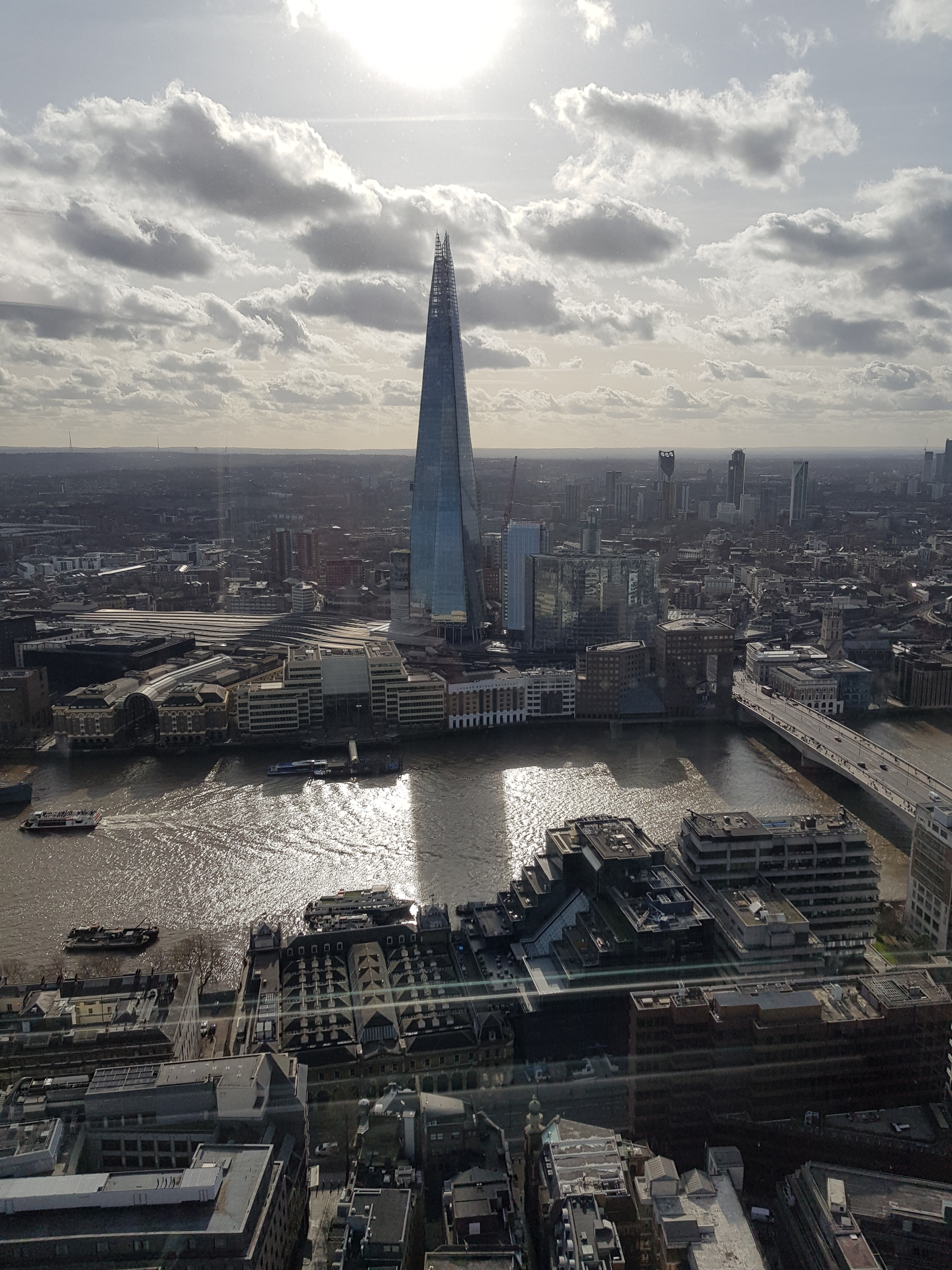 The Shard, vu du gratte-ciel situé au 20, Fenchurch Street, à Londres.